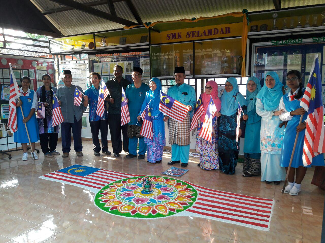 Barisan Guru dan Pelajar yang Terlibat dengan Majlis Perasmian Kolem Bulan Kemerdekaan